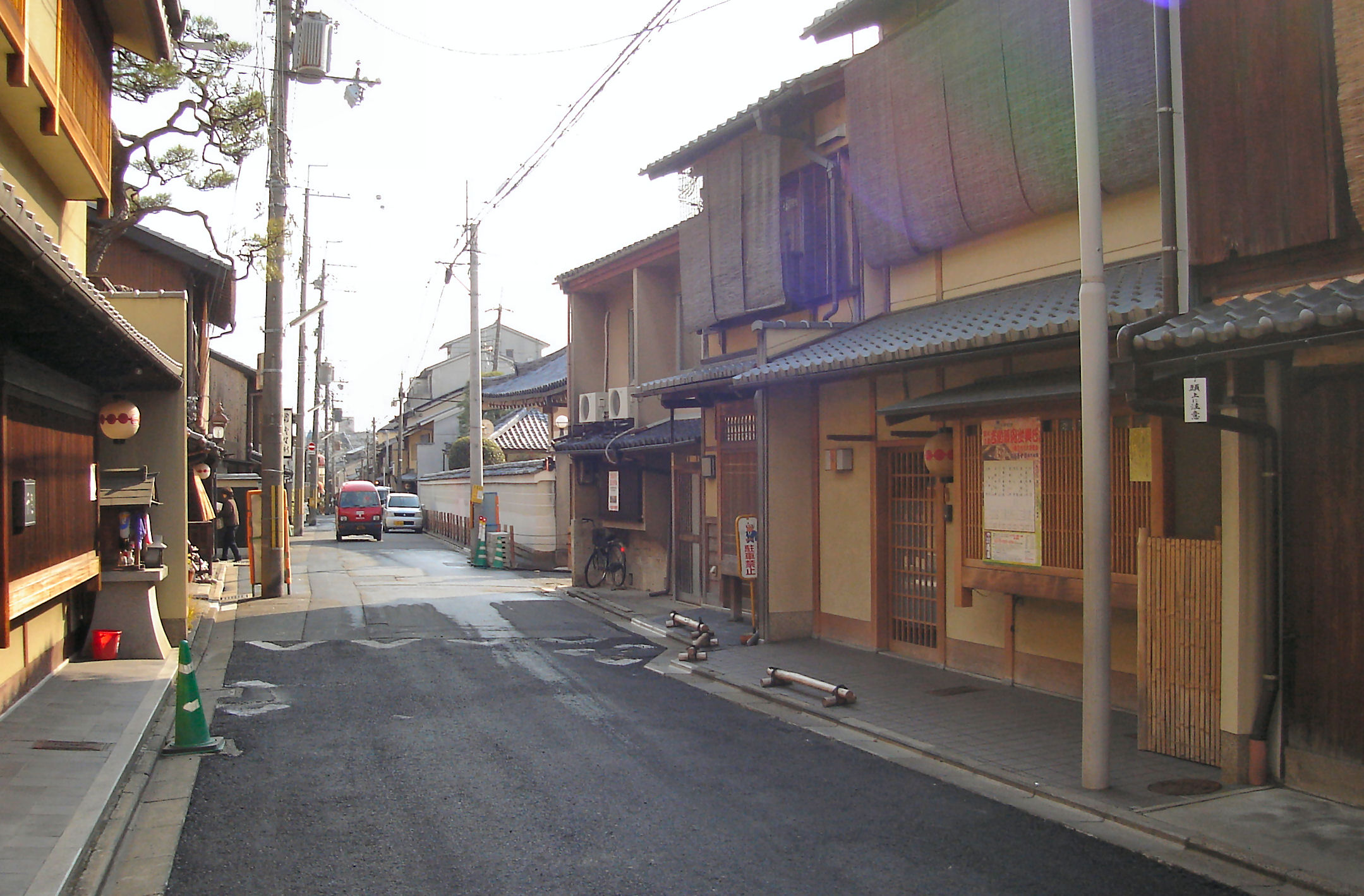 Kamishichiken , kyoto japan